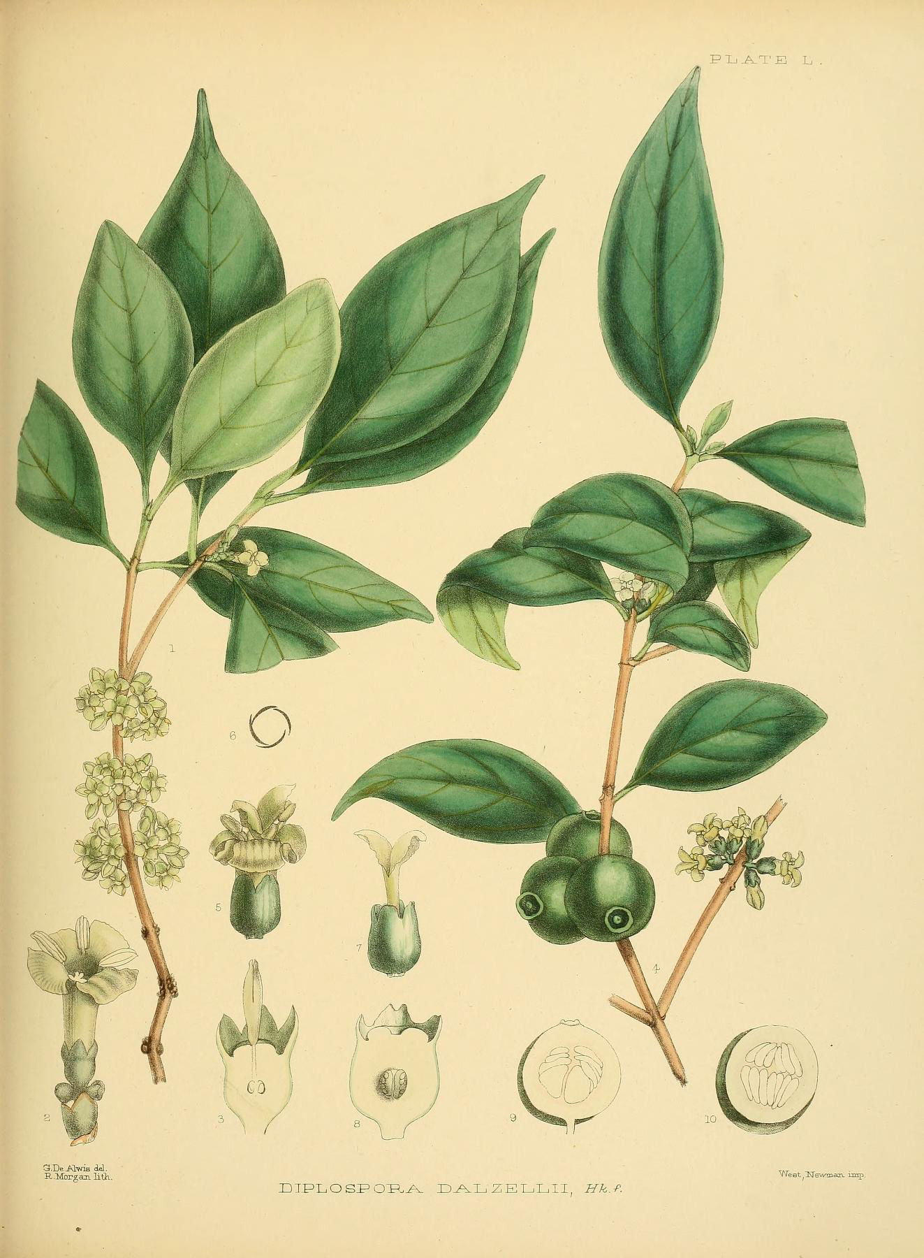 PLATE L, G. de Alwis del. R. Morgan lith. EIPLOSPOP.A DALZELLII, Hk.-P. West, Newman. imp.